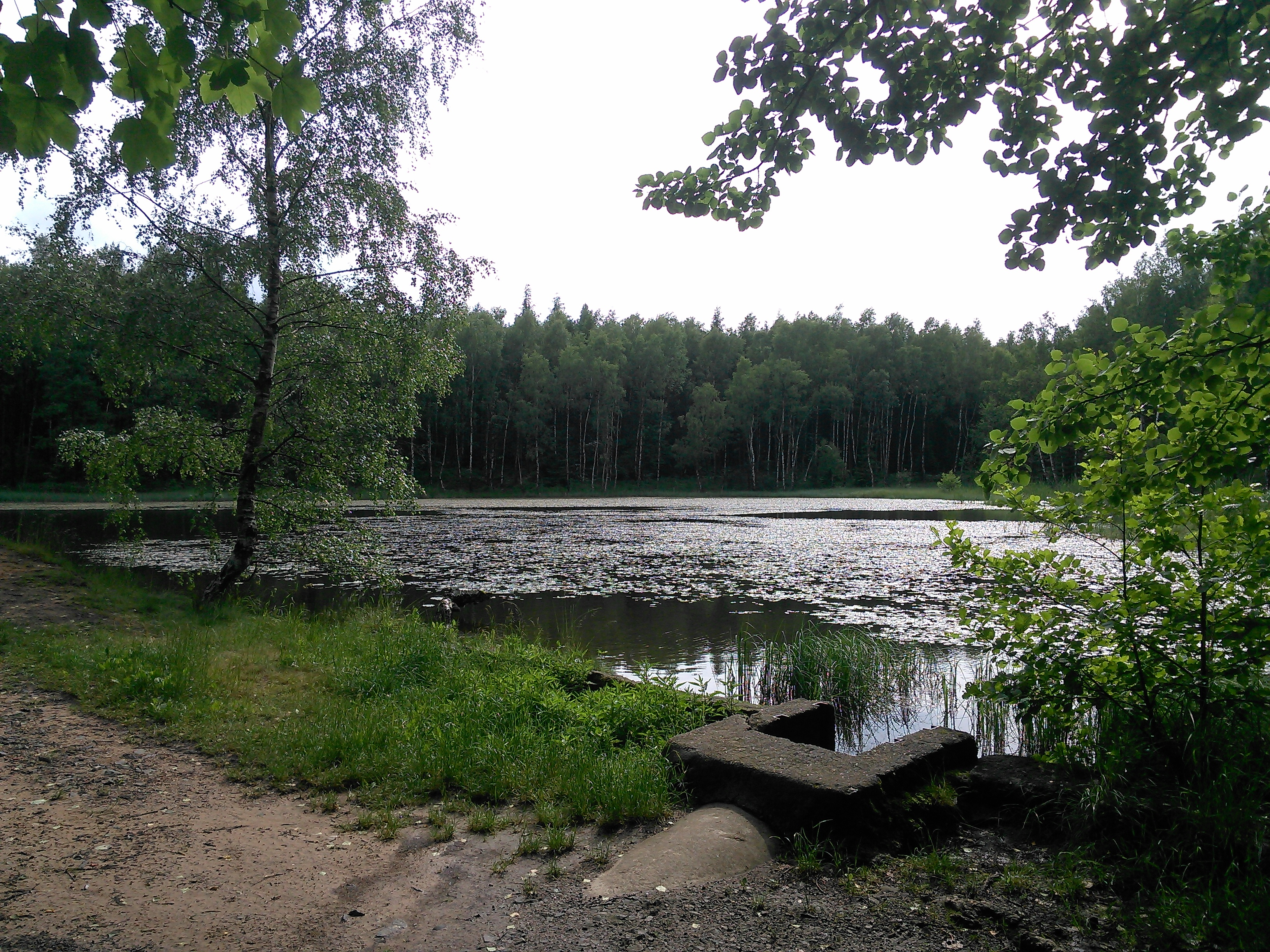 U hráze.